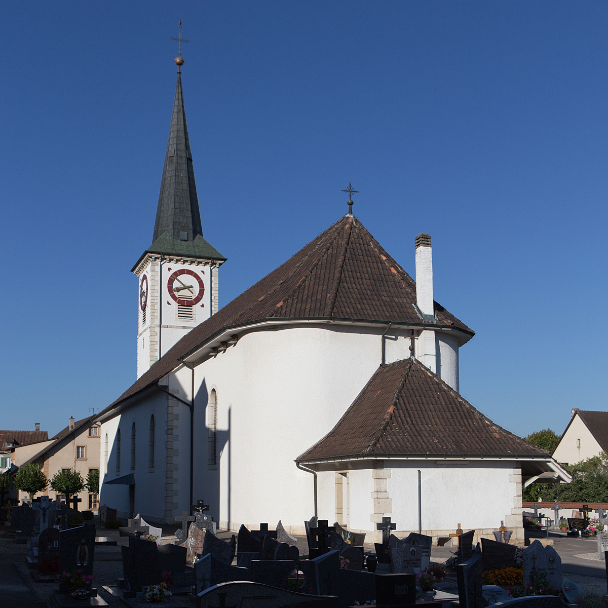 L'église Saint-Vincent à Cornol (JU)